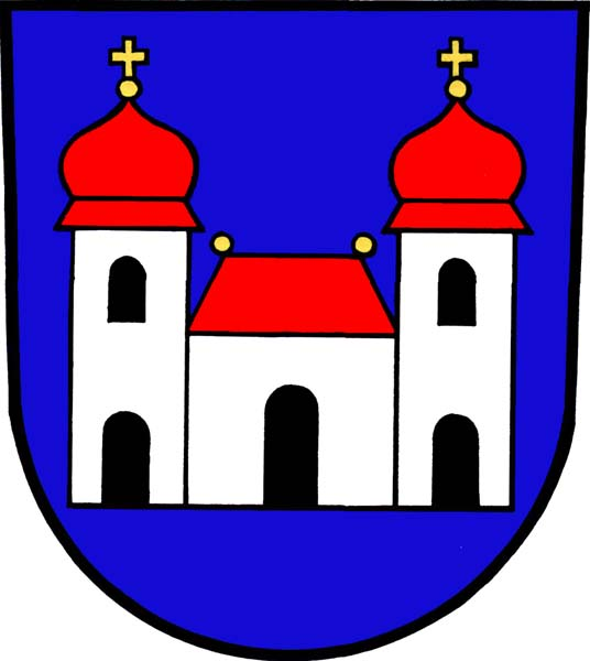 Znak obce Machov